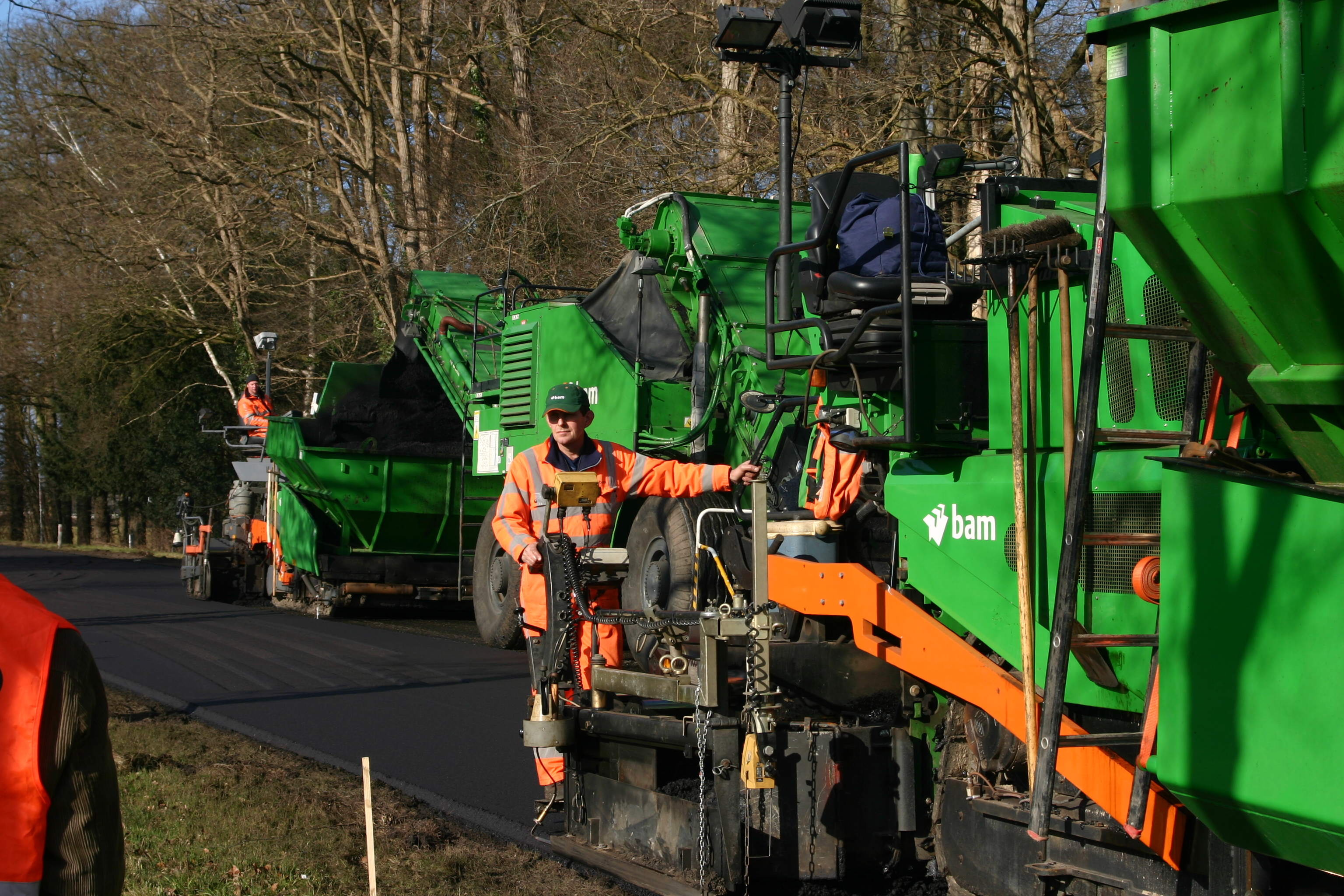 Asfalteringswerkzaamheden N346 Zutphen-Lochem door BAM Wegen Regio Oost